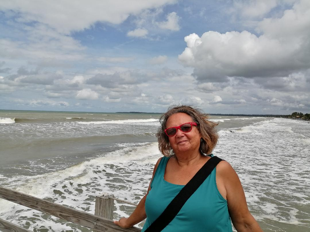 Foto 25 en 2020